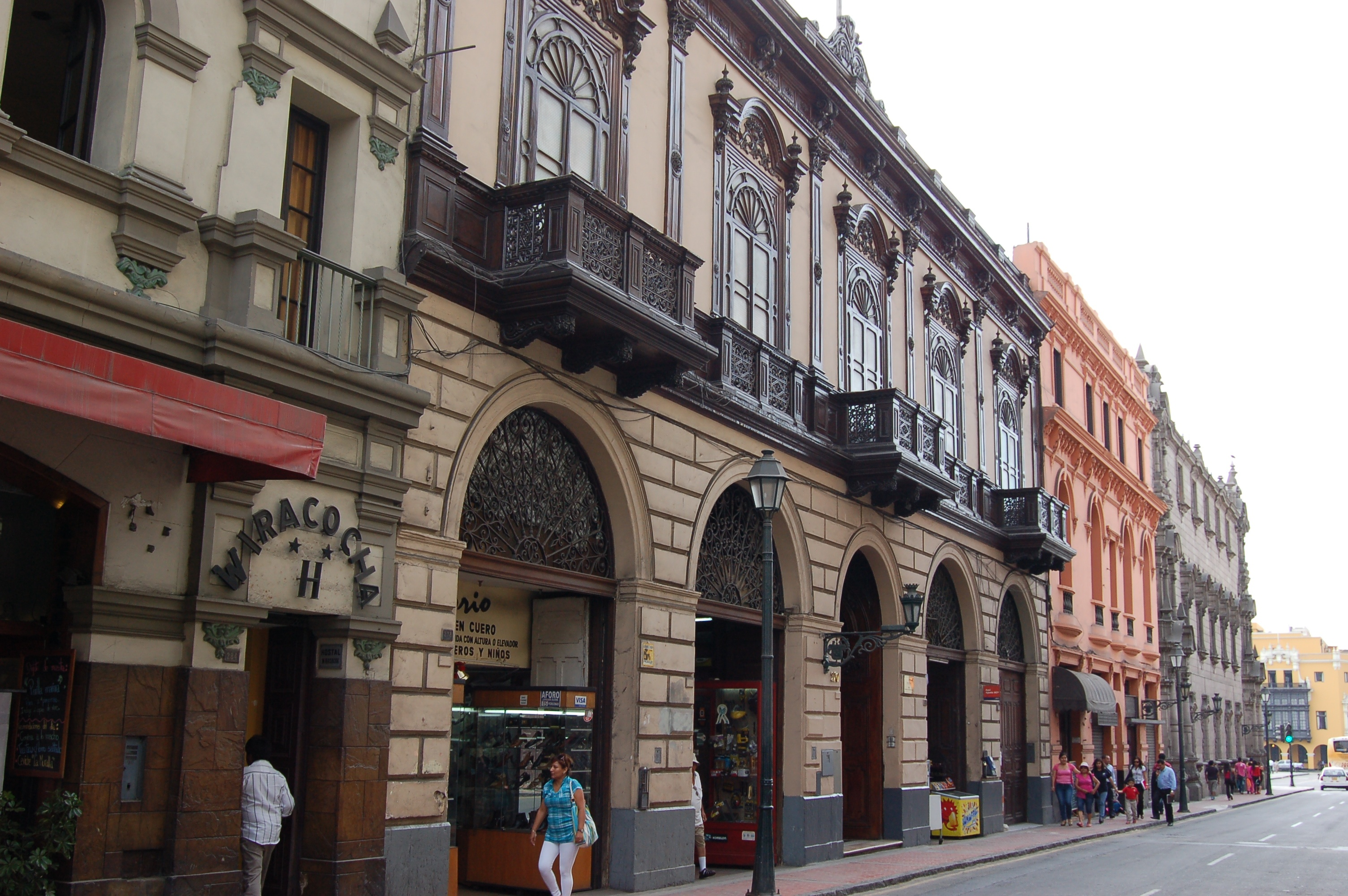 Jirón Junín - Rimac, Lima, Perú